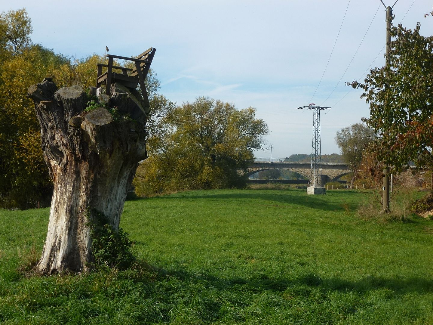 Hochsitz in Maaschwitz vor der Brücke über die Freiberger Mulde